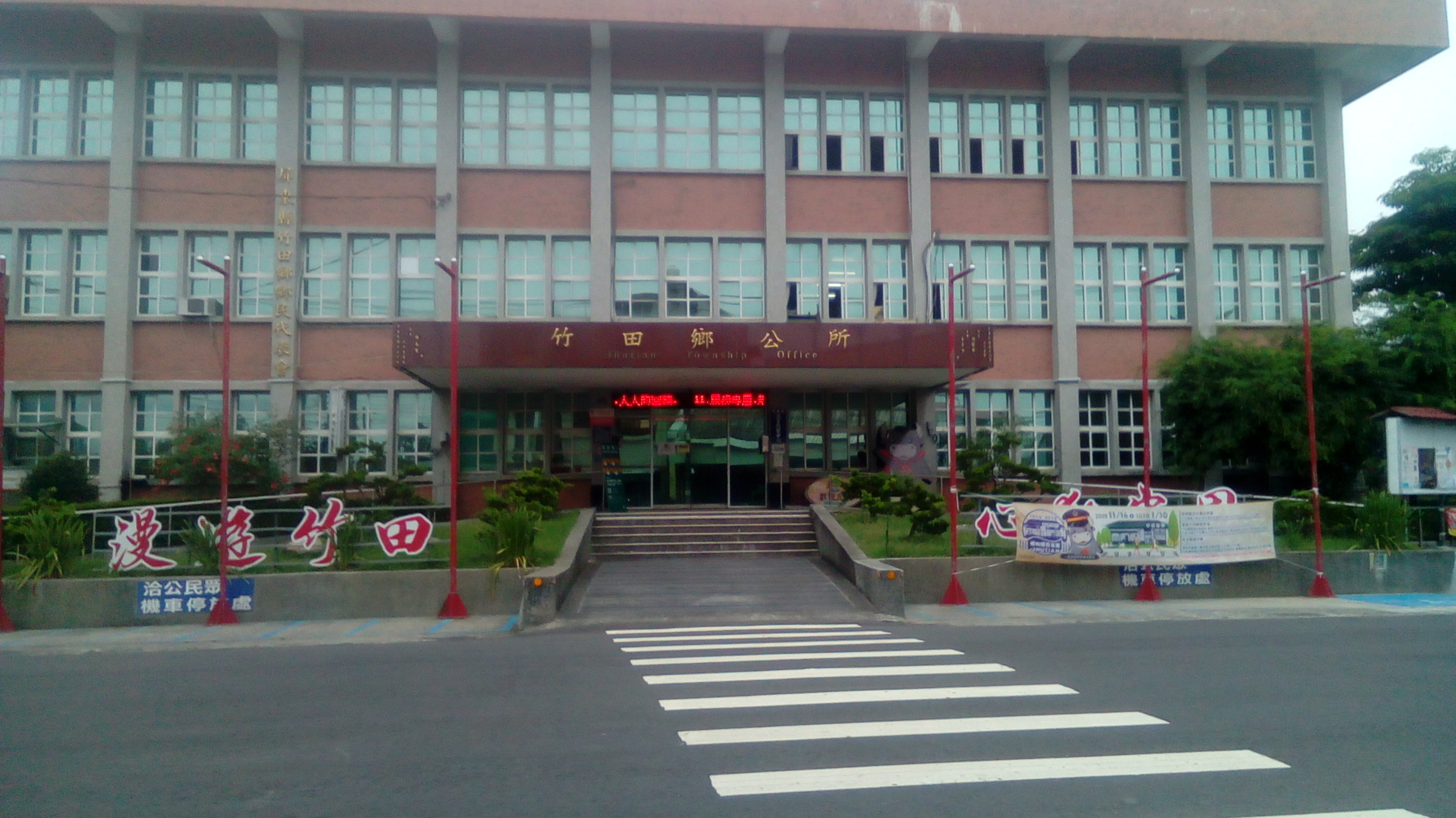 同上